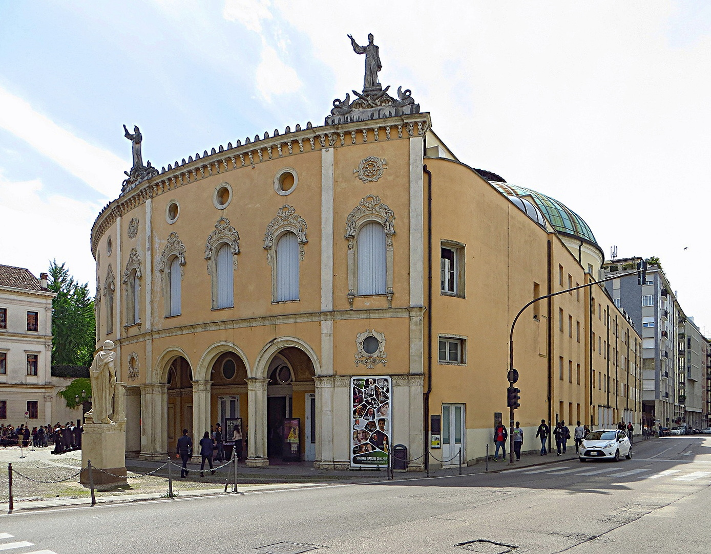 Teatro Stabile del Veneto -Teatro Verdi